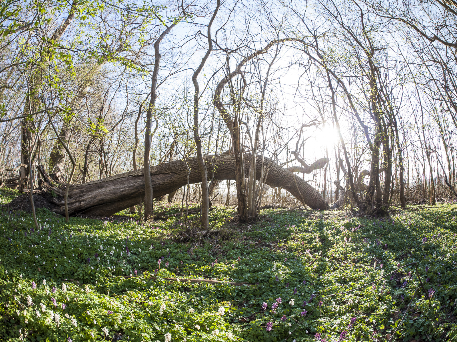 Suserup Skov